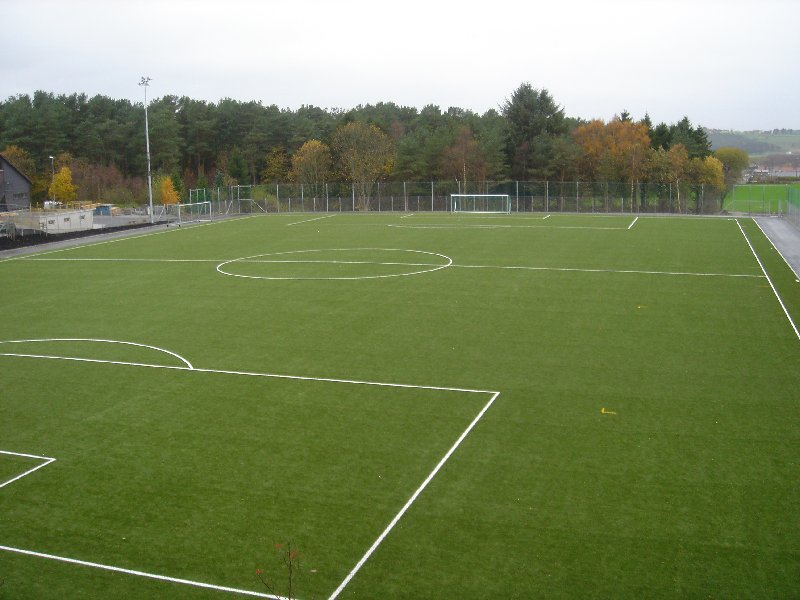 Kunstgressbanen på Sandnes idrettspark